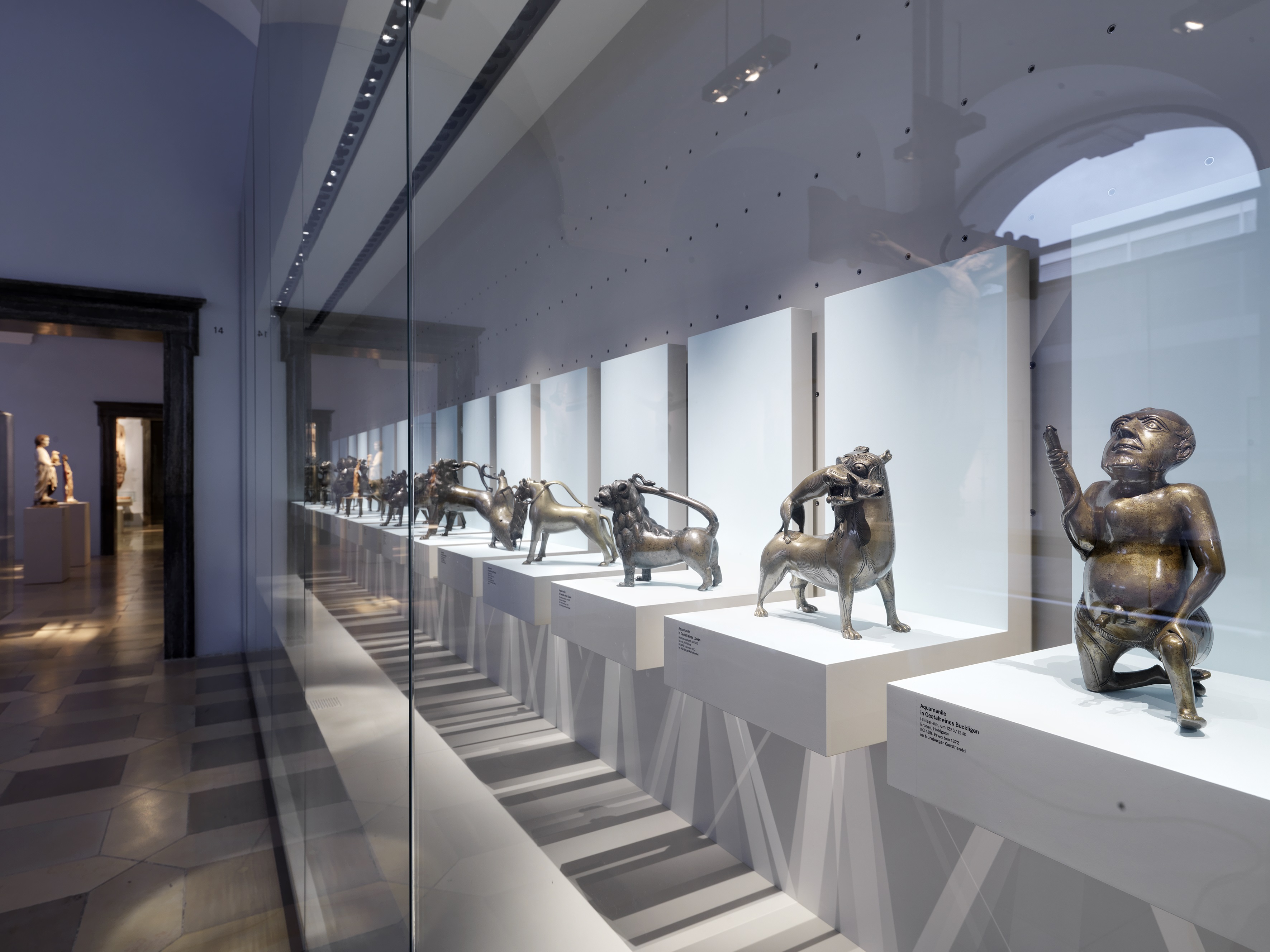 Sammlung Mittelalterlicher Aquamanilen im Germanischen Nationalmuseum